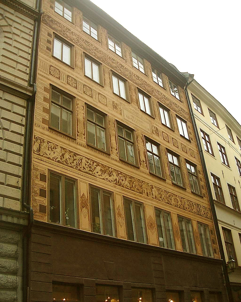 Västerlånggatan, Gamla stan, Stockholm